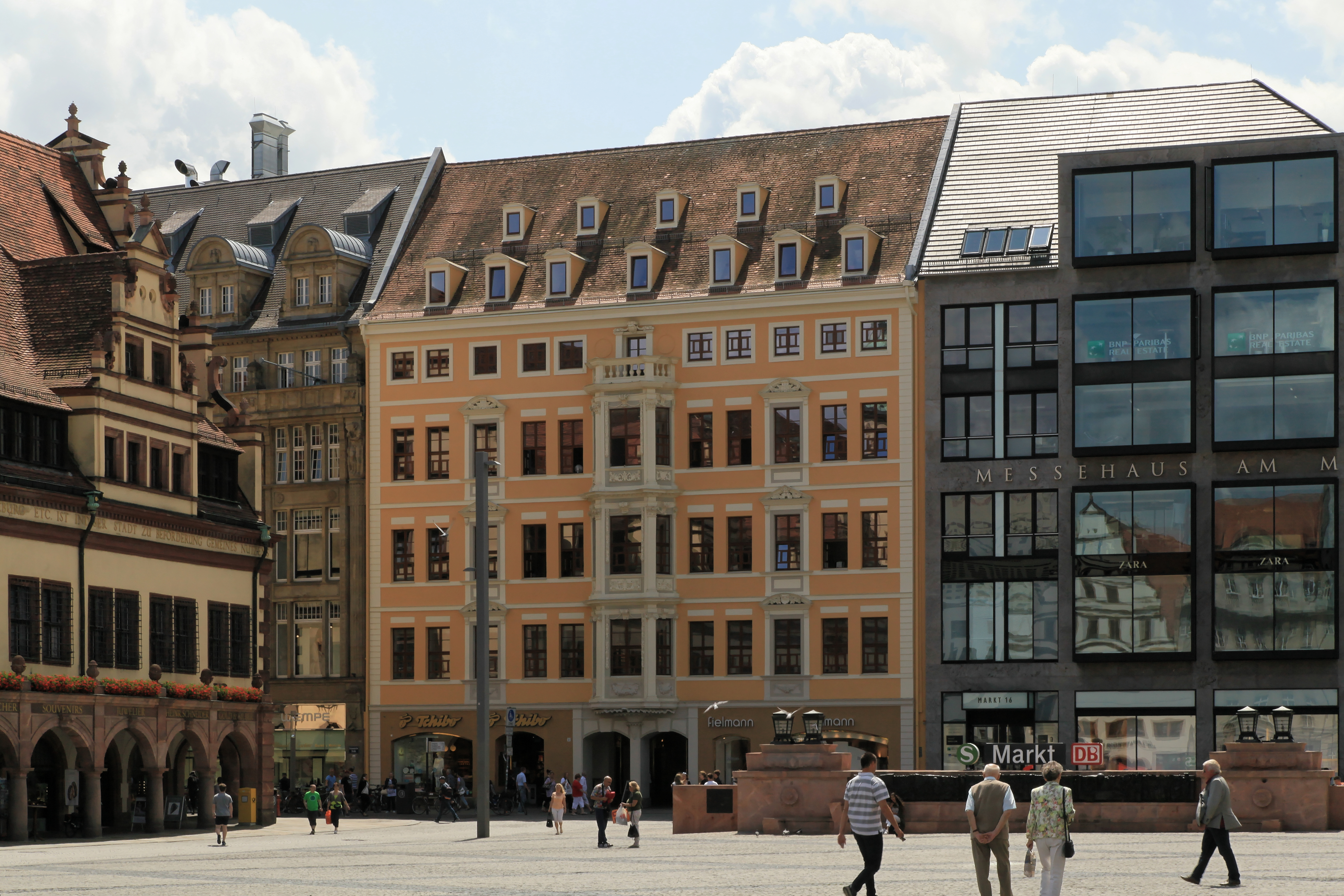 Markt mit Königshaus und Messehaus am Markt in Leipzig